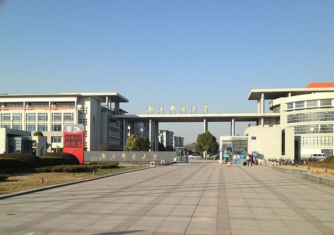 Nanjing University of Posts and Telecommunications